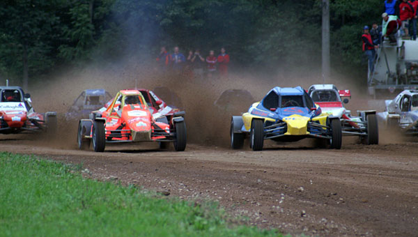 Bildbeschreibung: ... Quelle: Fotograf/Zeichner: Ramona Weiß ( Datum: 18.09.2005 Sonstiges: Bild ist gemeinfrei